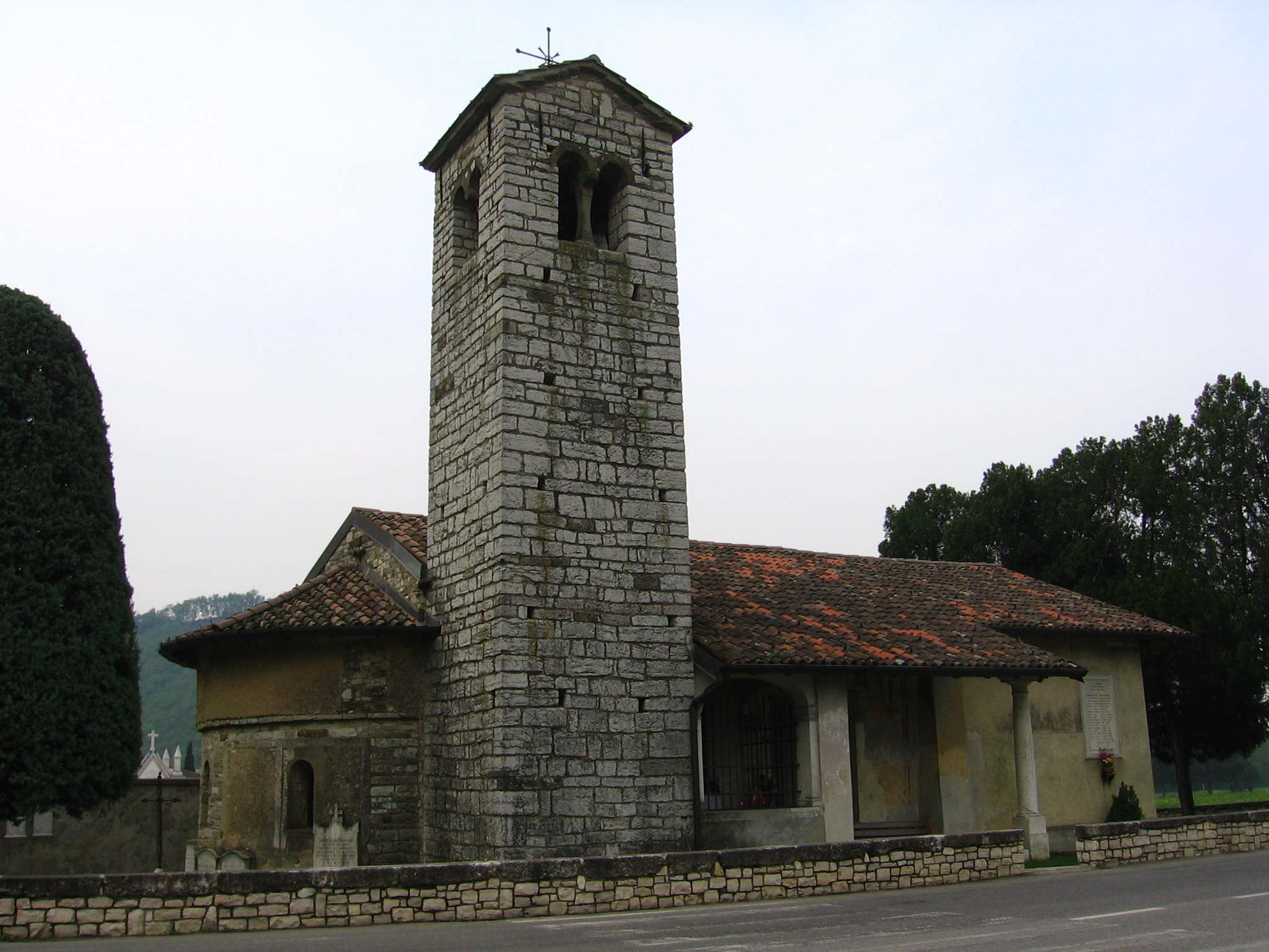 Chiesa di San Giorgio in Campis, Zandobbio, Bergamo, Italia